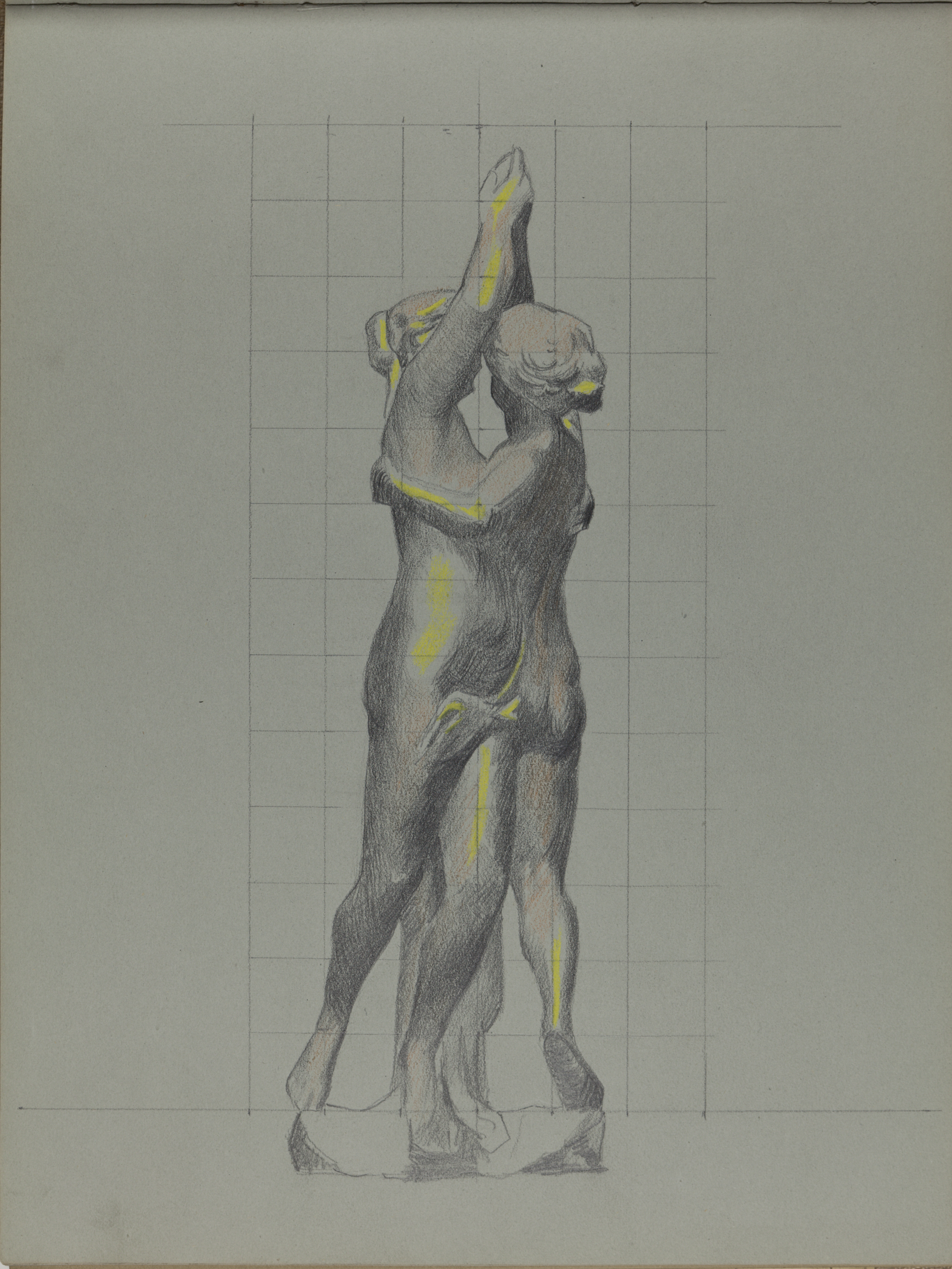 Johann Friedlin luonnosvihko: veistoksen luonnos Tekijä / creator: Johann Friedl TaiK:Friedl:011 Aalto-yliopisto / Aalto University Tiedätkö lisää tästä kuvasta? Jätä kommentti tai ota yhteyttä sähköpostitse: Lisätietoja kuvakokoelmista / more information